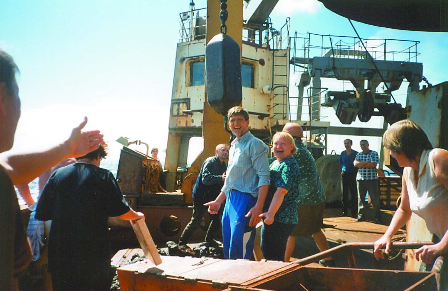 ВНИИОкеангеология: Работы на ГПС